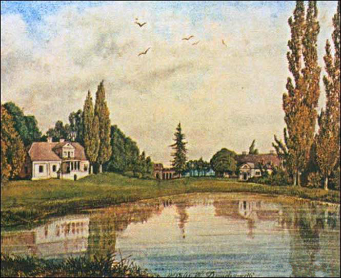 1861. Туганавічы, двор і пуня